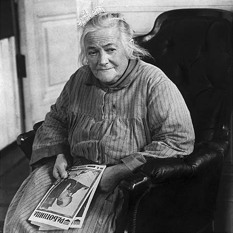 Clara Zetkin (1857-1933)